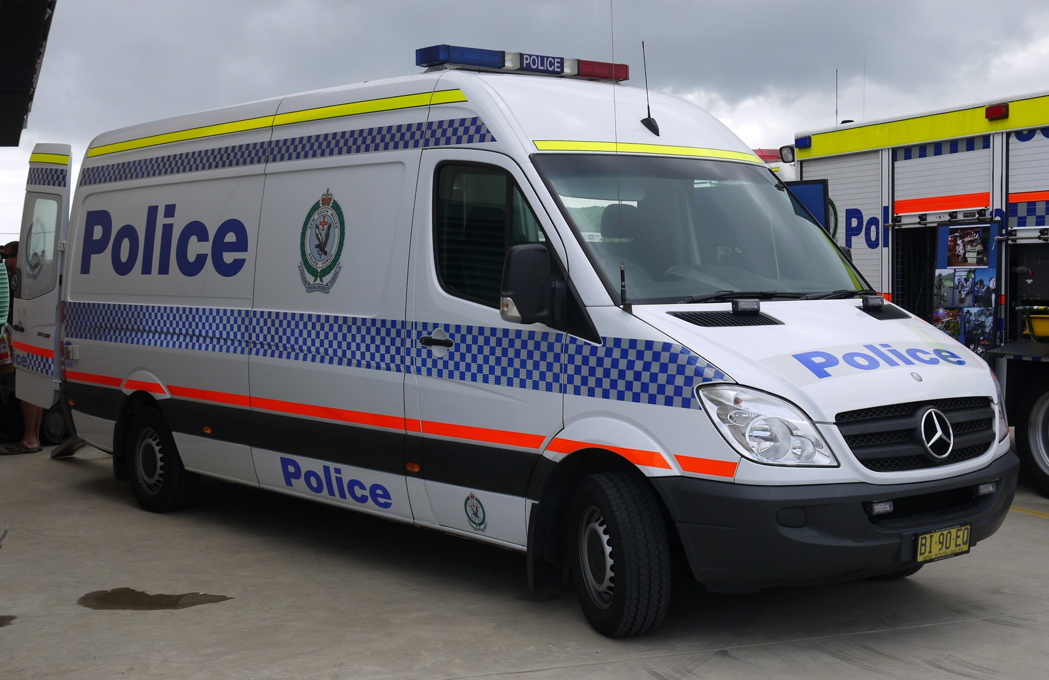 NSWPF Rescue and Bomb Disposal Unit Mercedes Benz Sprinter